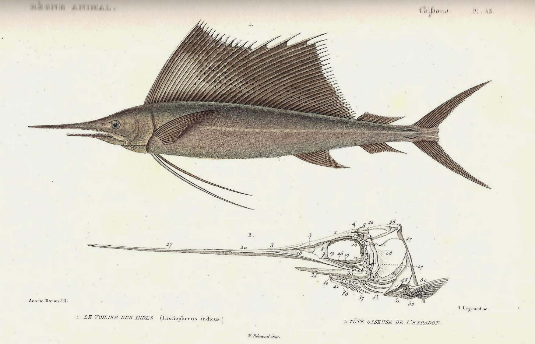 Istiophorus platypterus syn. Histiophorus indicans Planche N°53 du livre "Le règne animal distribué d'après son organisation" par Georges Cuvier (Tome 8), seconde édition de 1828, représentant l'histiophorus